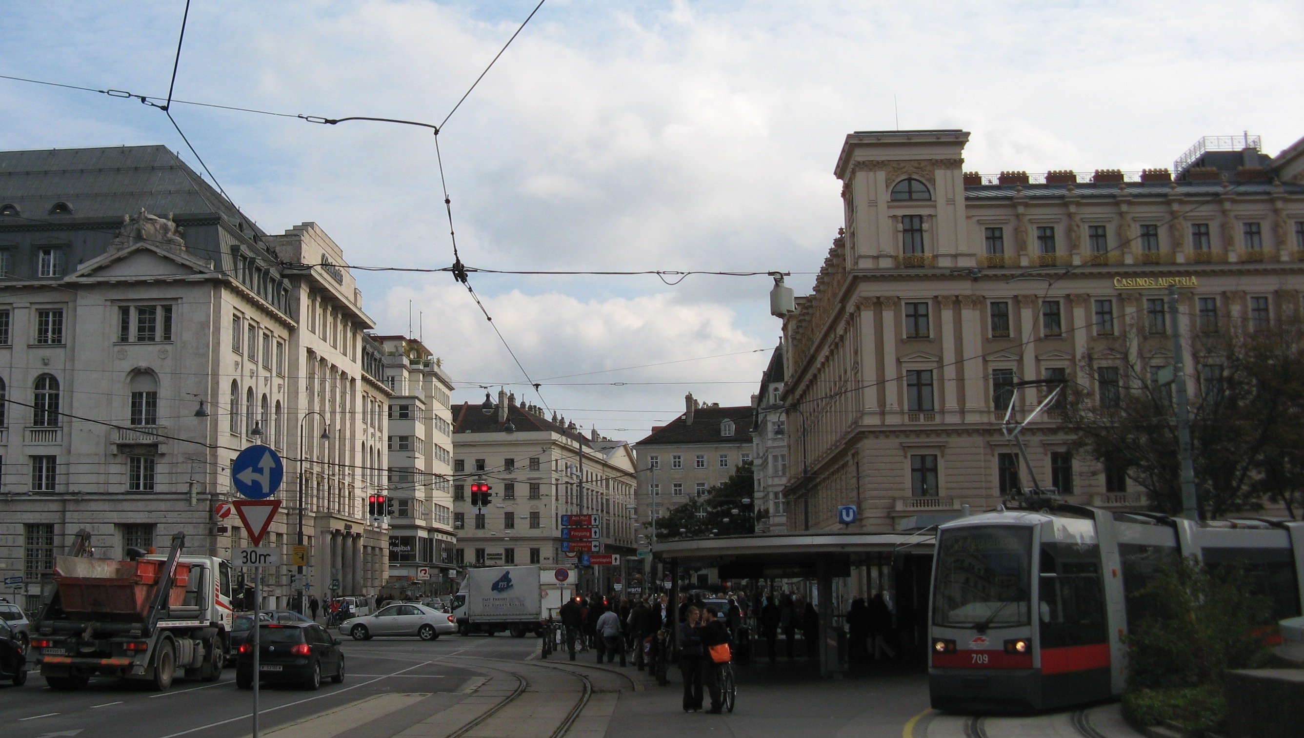 Schottengasse vom Schottentor aus, Wien-Innere Stadt